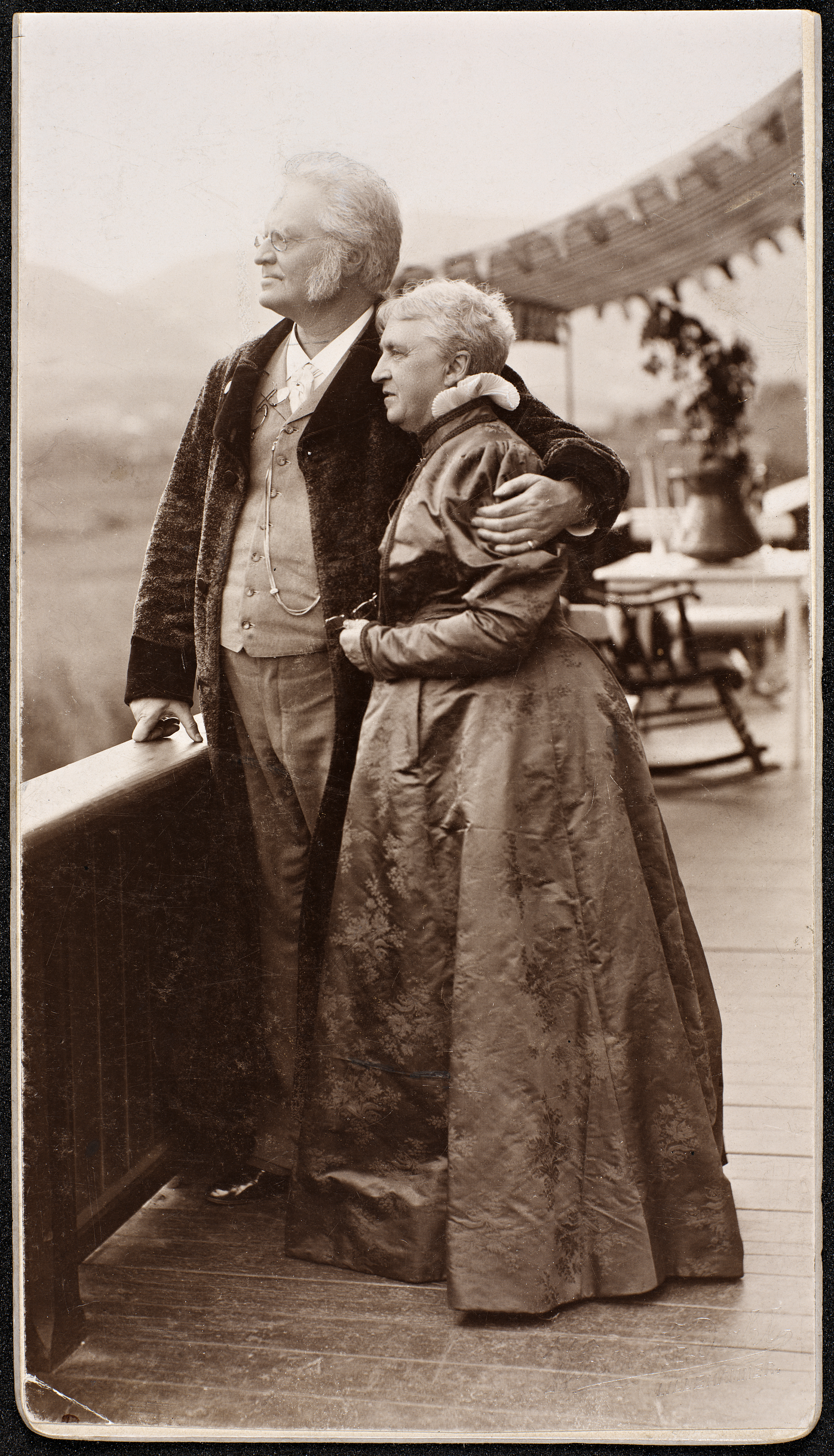 Tittel / Title: Portrett av Karoline og Bjørnstjerne Bjørnson på Aulestad Dato / Date: 1897 Fotograf / Photographer: Vinsnes & Dahl Sted / Place: Oppland, Gausdal, Aulestad Eier / Owner Institution: Nasjonalbiblioteket / National Library of Norway Lenke / Link: Bildesignatur / Image Number: blds_01593